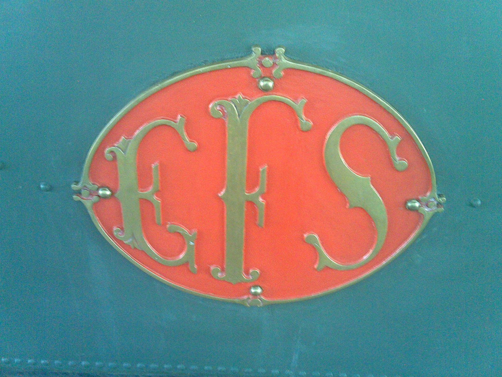 Detalhes da locomotiva do Museu Ferroviário de Indaiatuba.